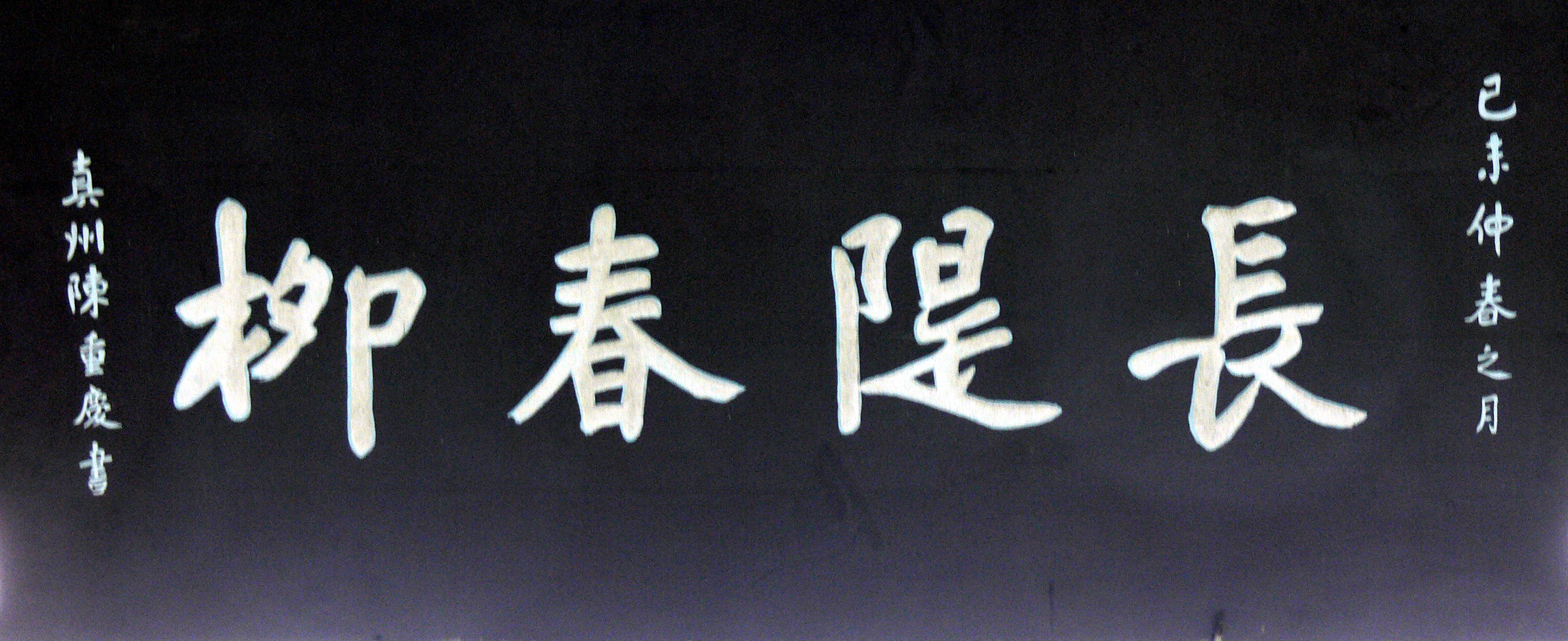 揚州瘦西湖長隄春柳亭牌匾